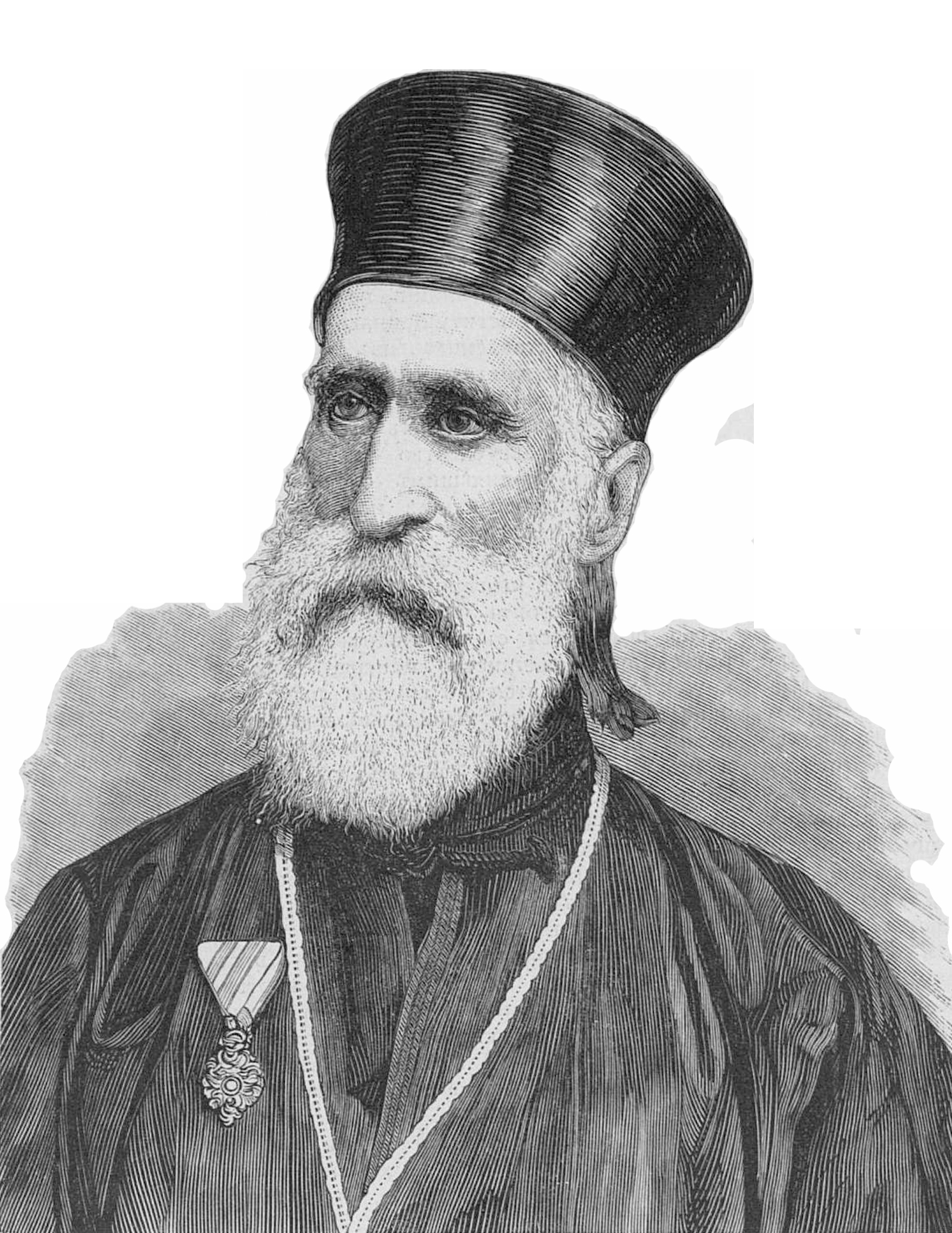 Митрополит Феофил (Бендела)